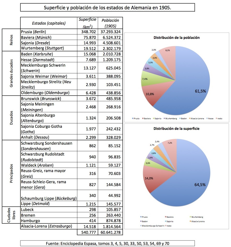 Población y superficie de los estados de Alemania en 1905.